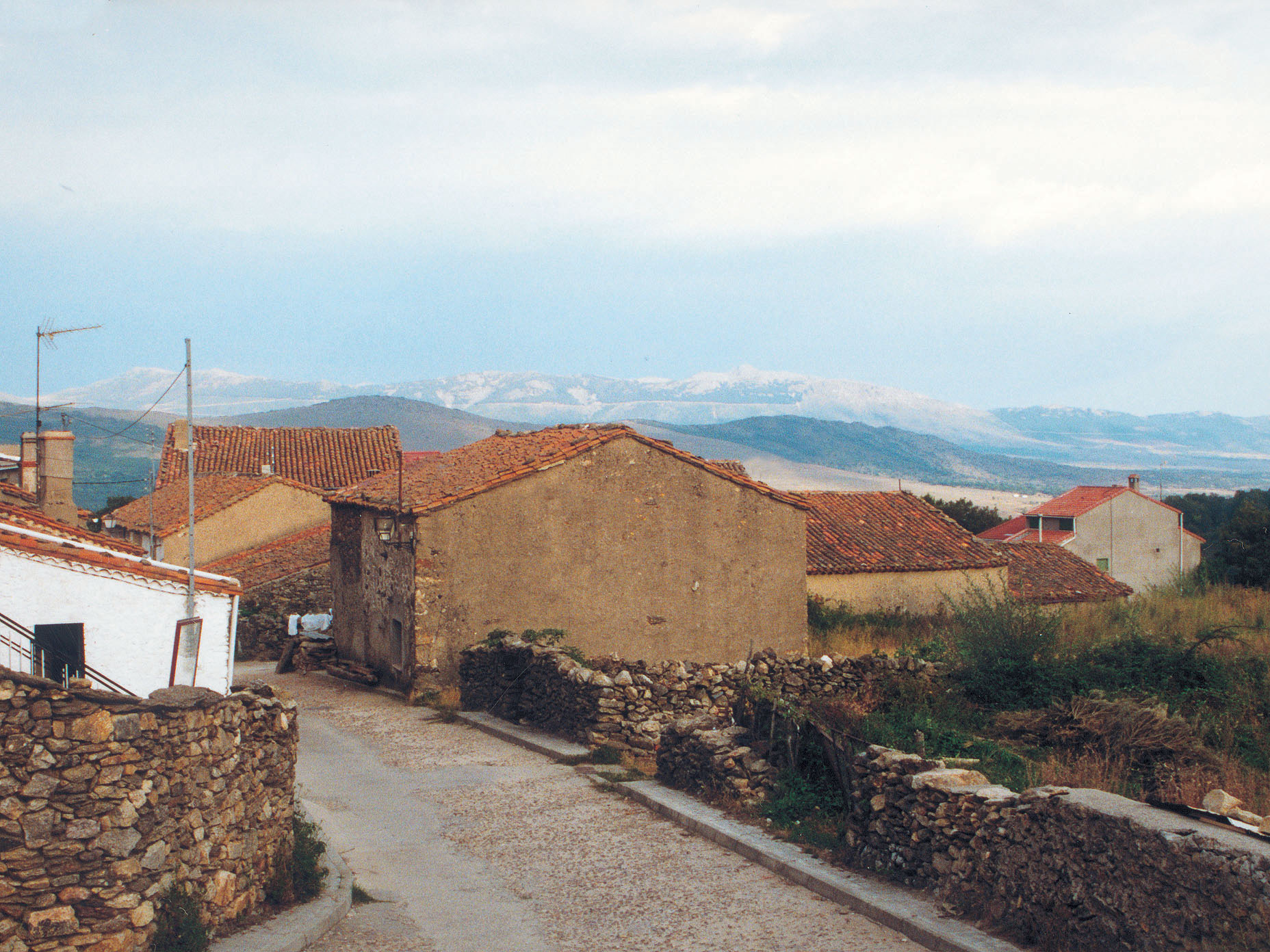 Casa y calle en La Acebeda.